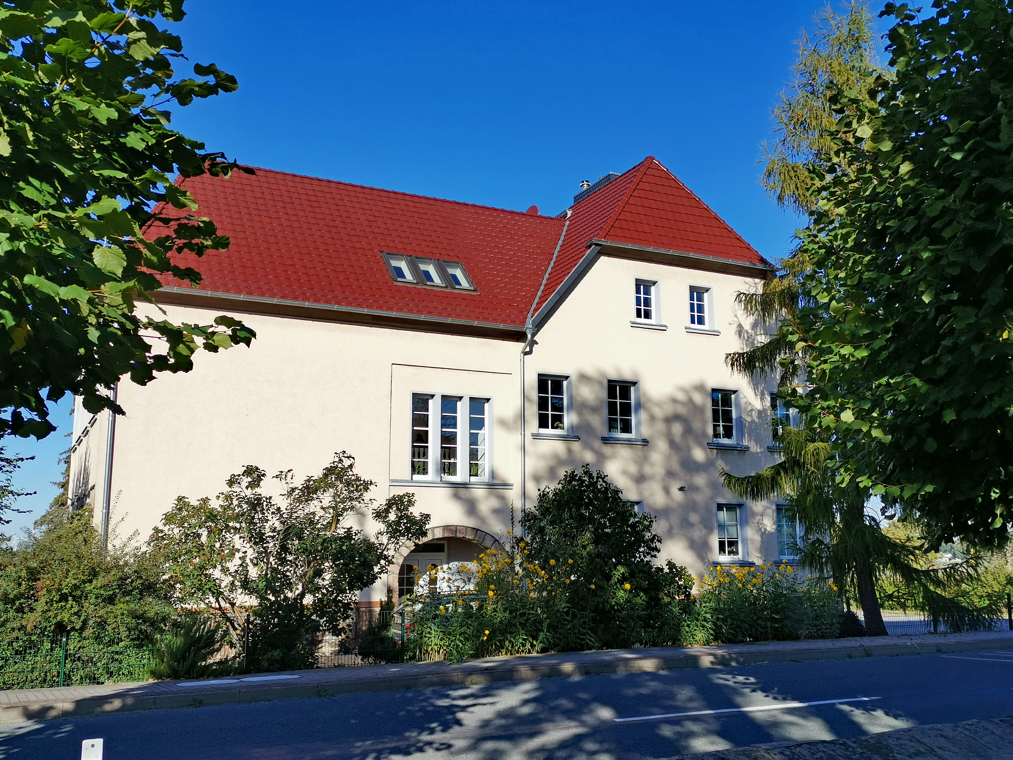 Schule gegenüber der Kirche Krusemark (Sachsen-Anhalt)